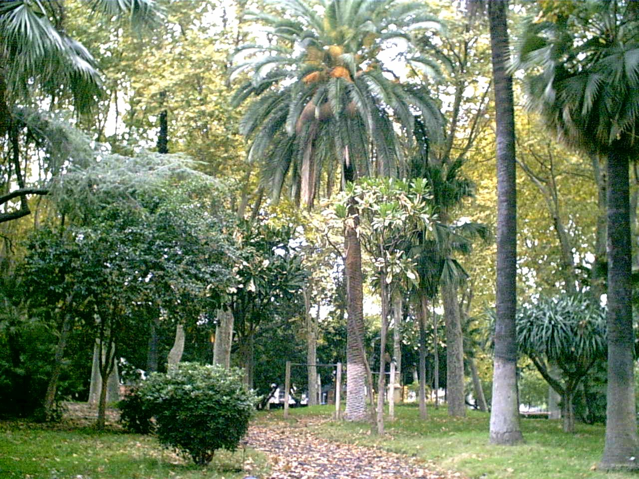 Villa Bellini,vegetazione rigogliosa (ma trascurata), lato nord